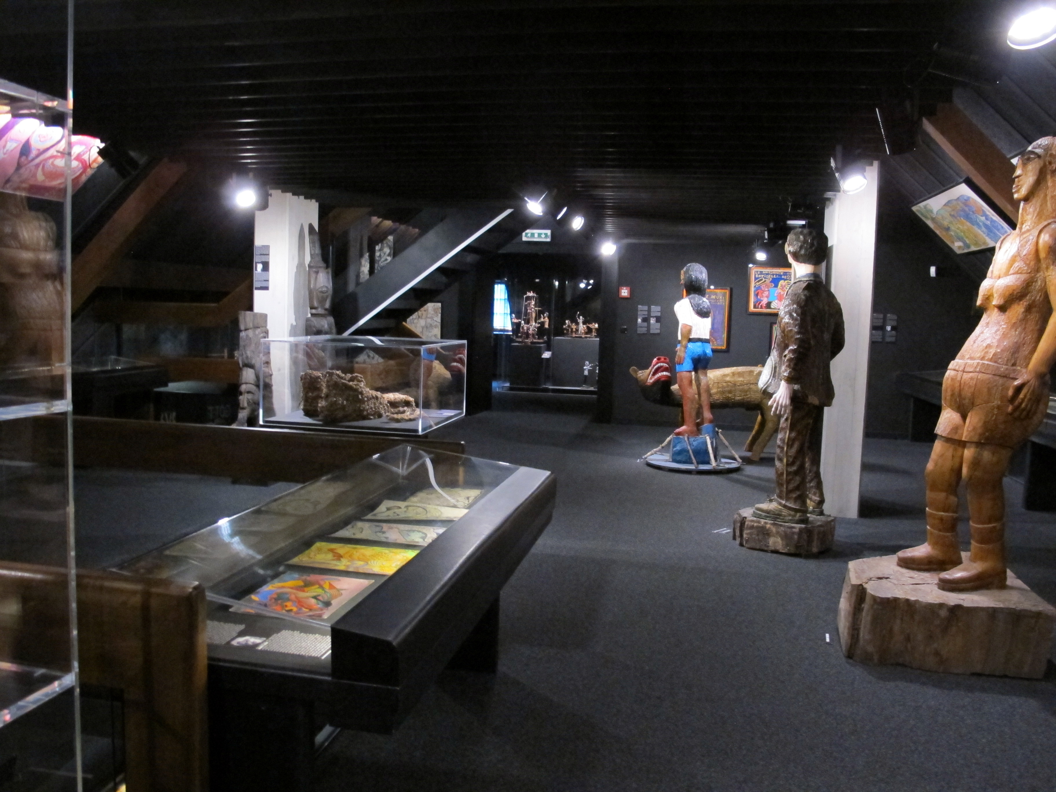 Losanna, Svizzera